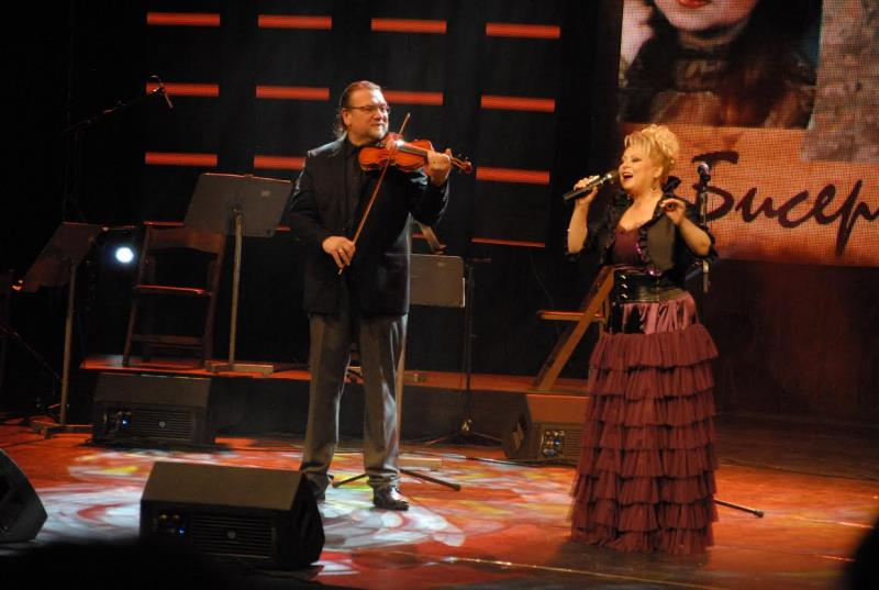 Заедно беа изведени народните песни „Параходот, Судбо моја, Назад, назад Калино моме во заендичка изведба со машкиот хор на Танец, како и “Т'га за југ“ на крајот од музичкиот блок.